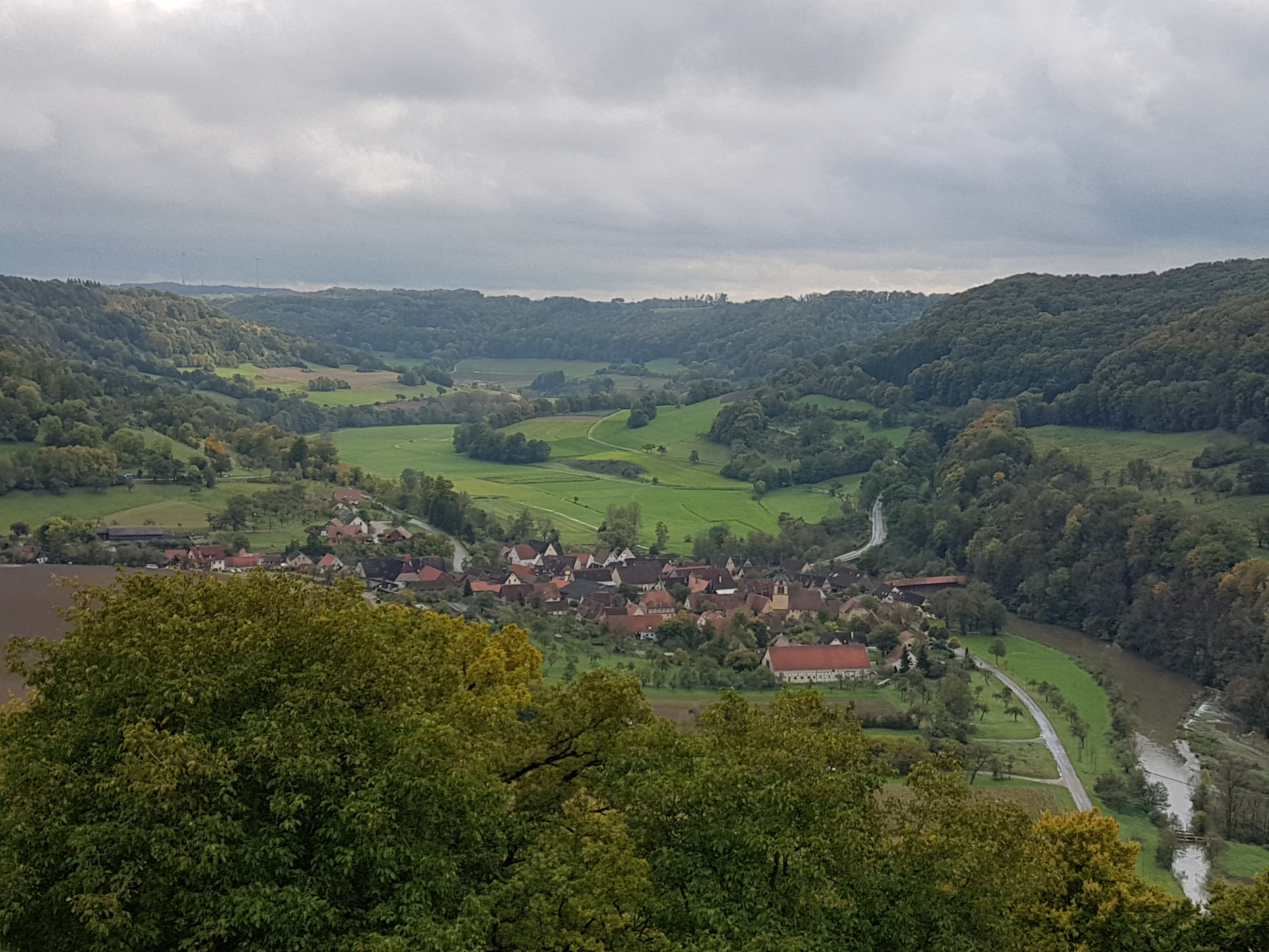 Blick von Langenburg auf Unterregenbach